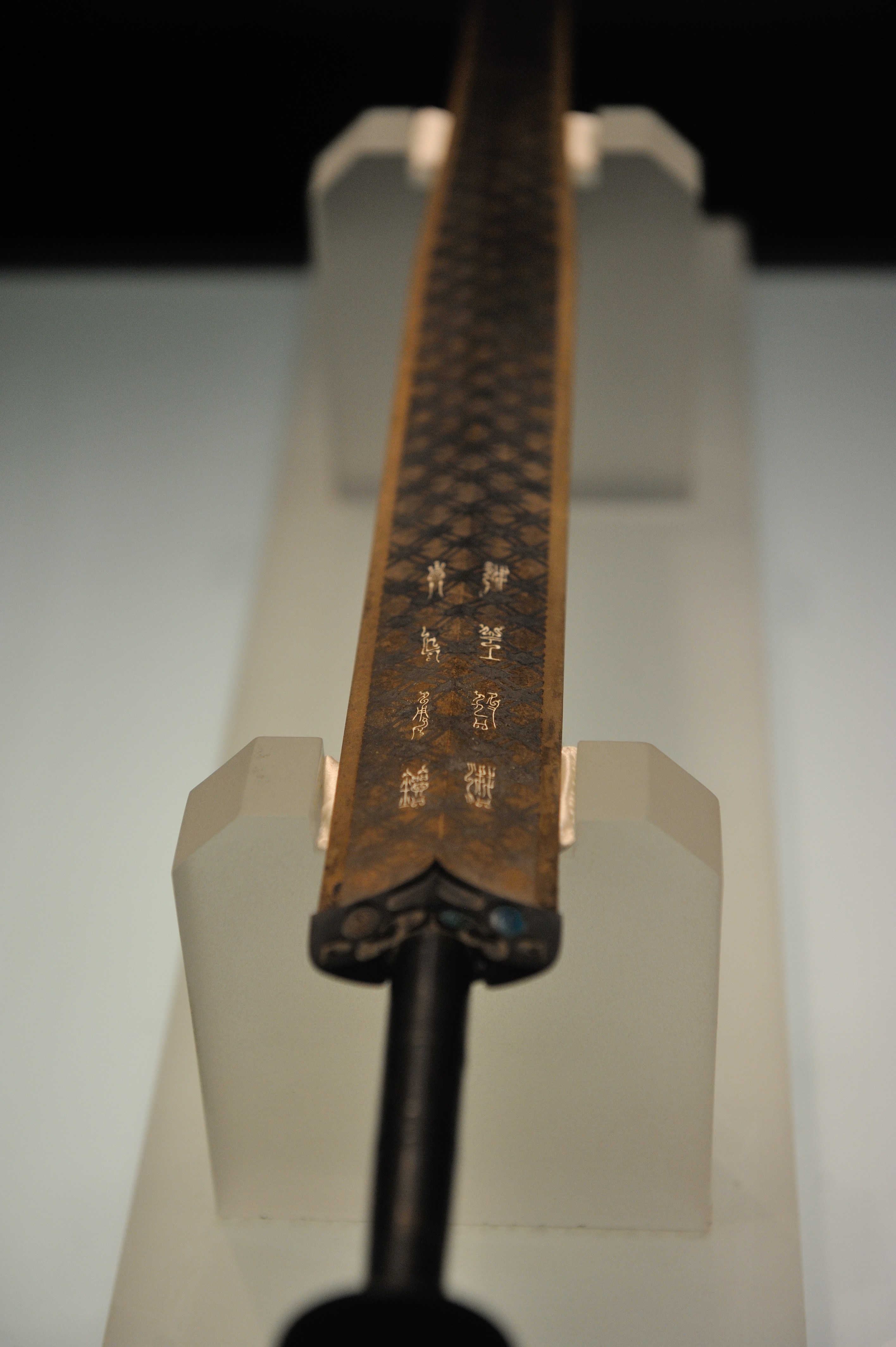 越王勾践剑，湖北省博物馆